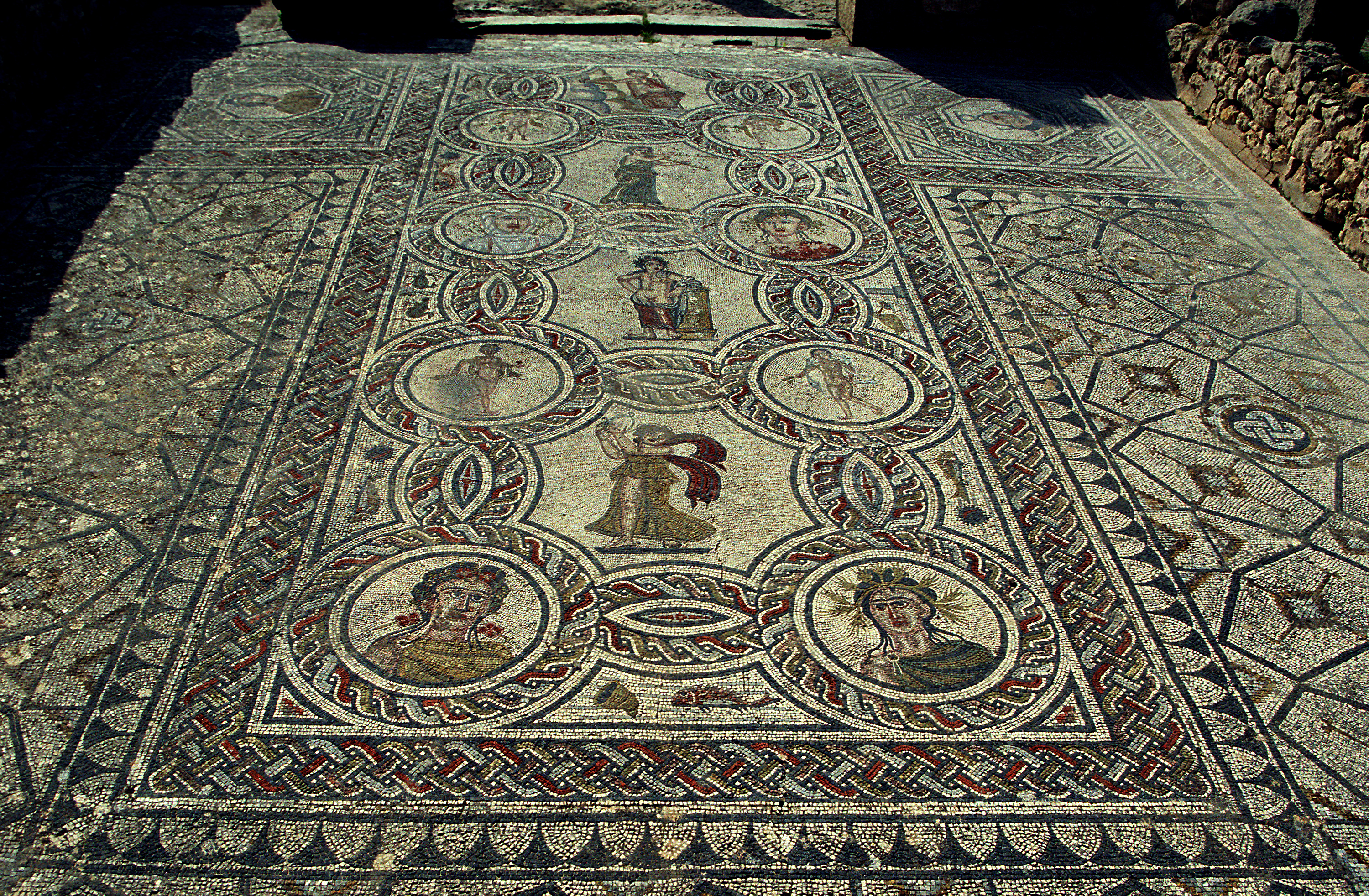 Volubilis, Morocco